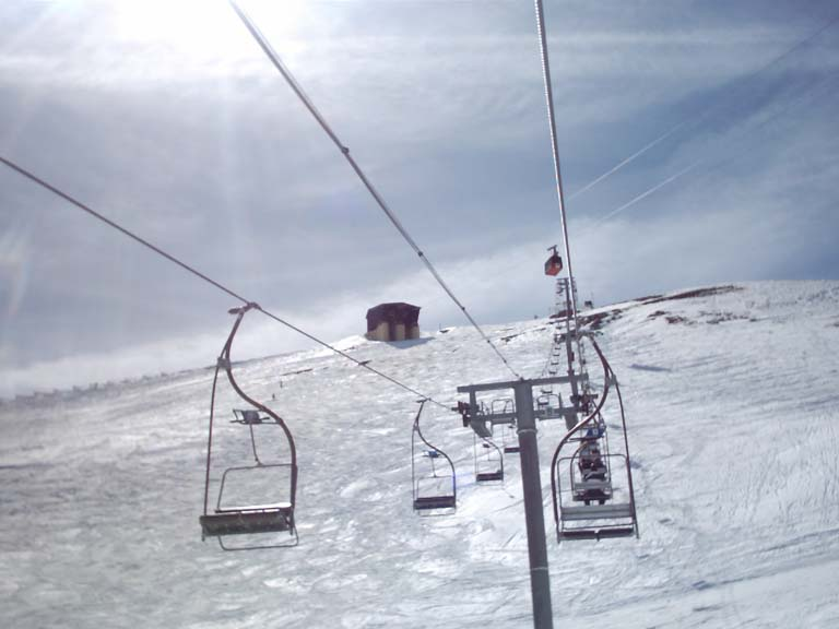 le plateau du Grand Alpe (Chantemerle) avant restructuration par un télésiège débrayable six places (Serre Chevalier)